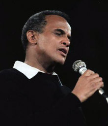 Title: Berlin, Konzert mit Harry Belafonte People in the image: Belafonte, Harry: Sänger, Bürgerrechtler, USA (GND 118508555) Factual corrections and alternative descriptions are encouraged separately from the original description. Additionally errors can be reported at this page to inform the Bundesarchiv. Original historic description: ADN-ZB/Lochmann/25.10.82/ Berlin: Auf der Manifestation der FDJ für den Frieden der Welt und gegen den NATO-Raketenbeschluß im Palast der Republik riefen die Lieder von Harry Belafonte und Dianne Reeves aus den USA große Begeisterung hervor.